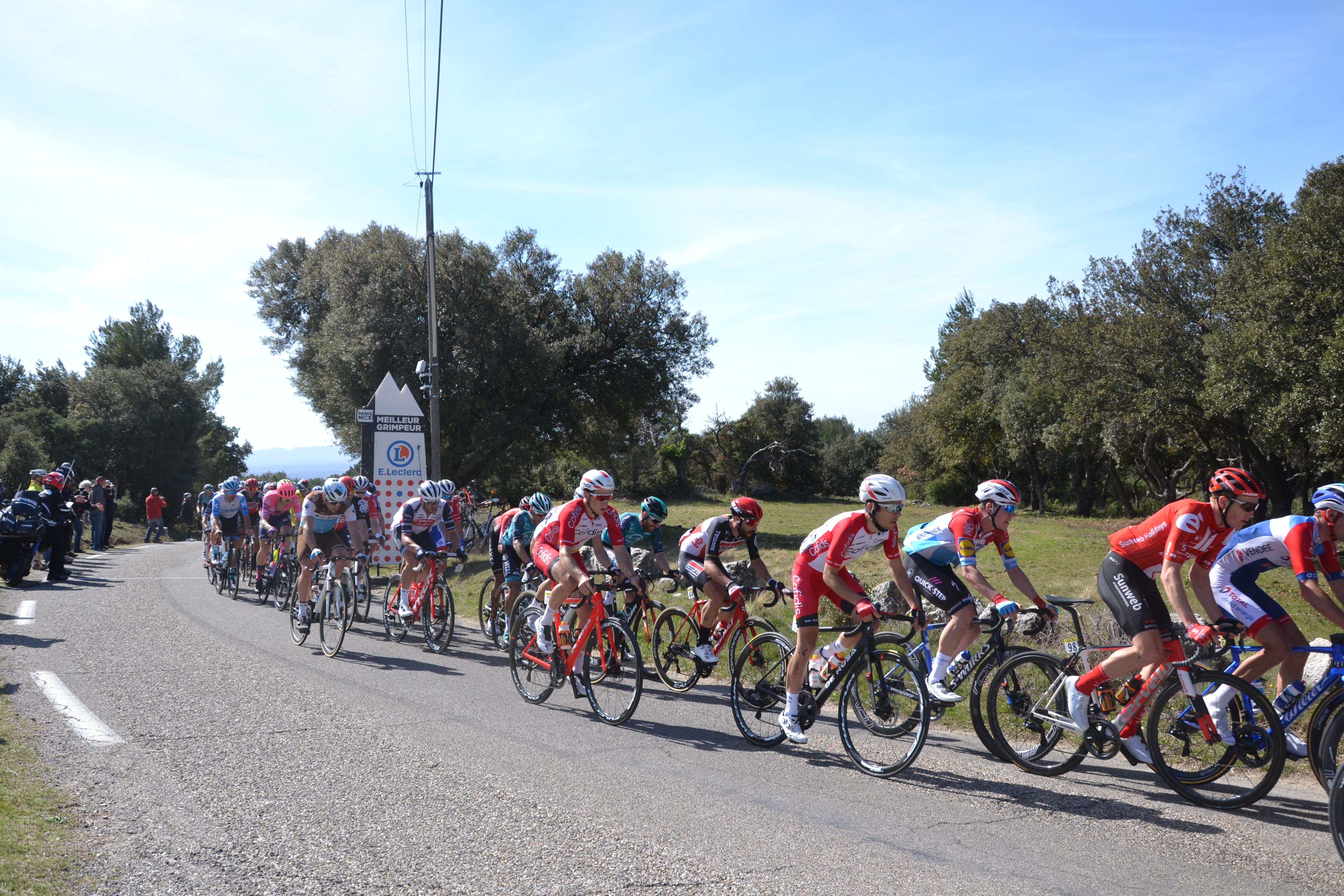 en course pour les points de la montagne